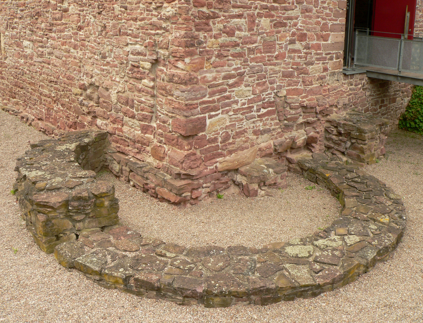 Turmfragment der Schulenburg am Münchhausen Museum in Bodenwerder